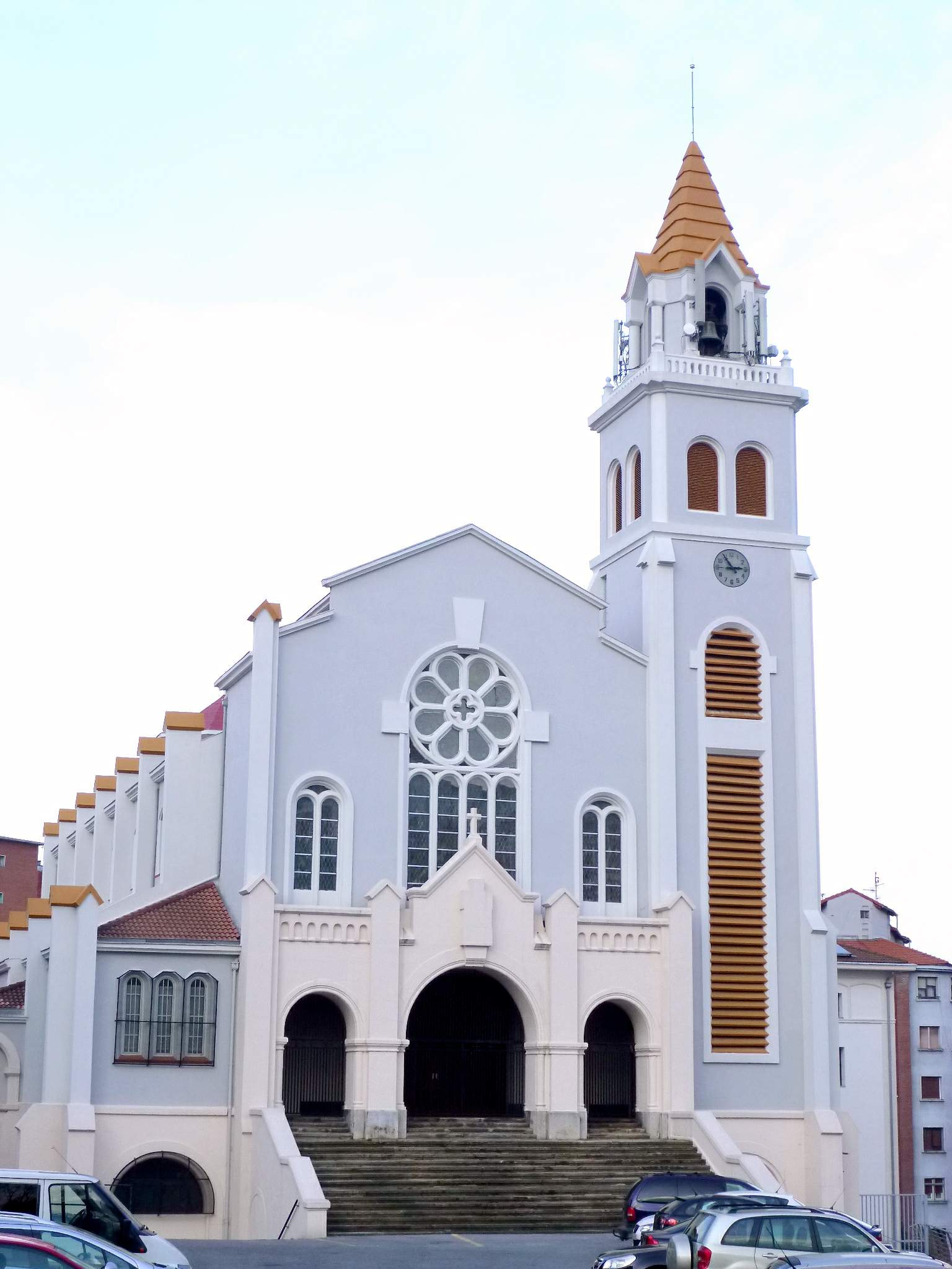 Iglesia de San Luis Beltrán (Bilbao)